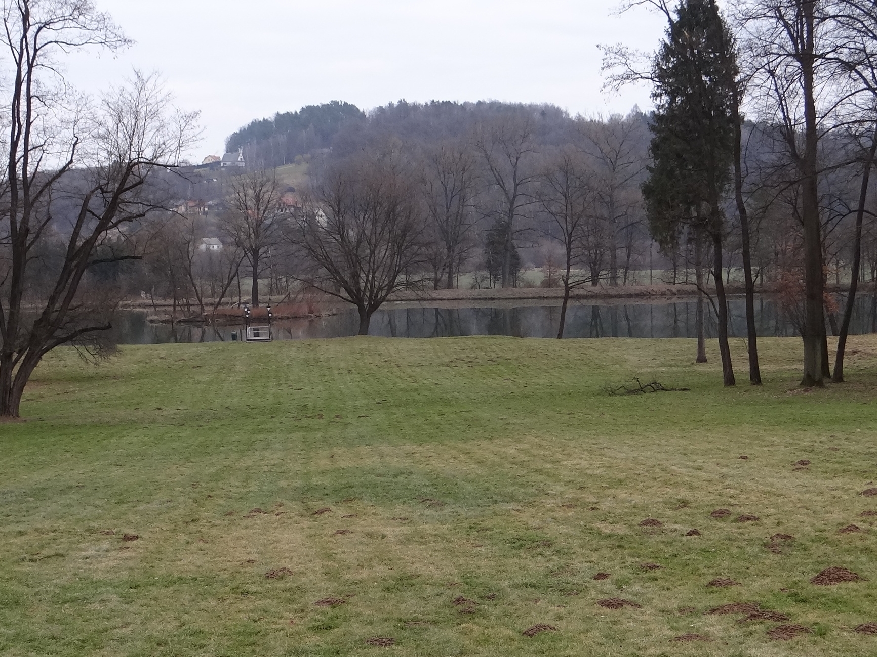 Park przy dworku I.J. Pendereckiego w Kąsnej Dolnej i widok na wzgórze Skała w Ciężkowicach